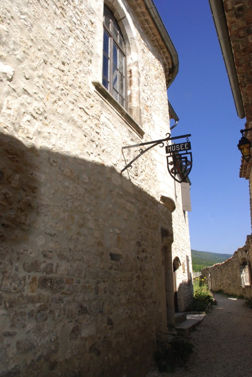 Poetlaval10